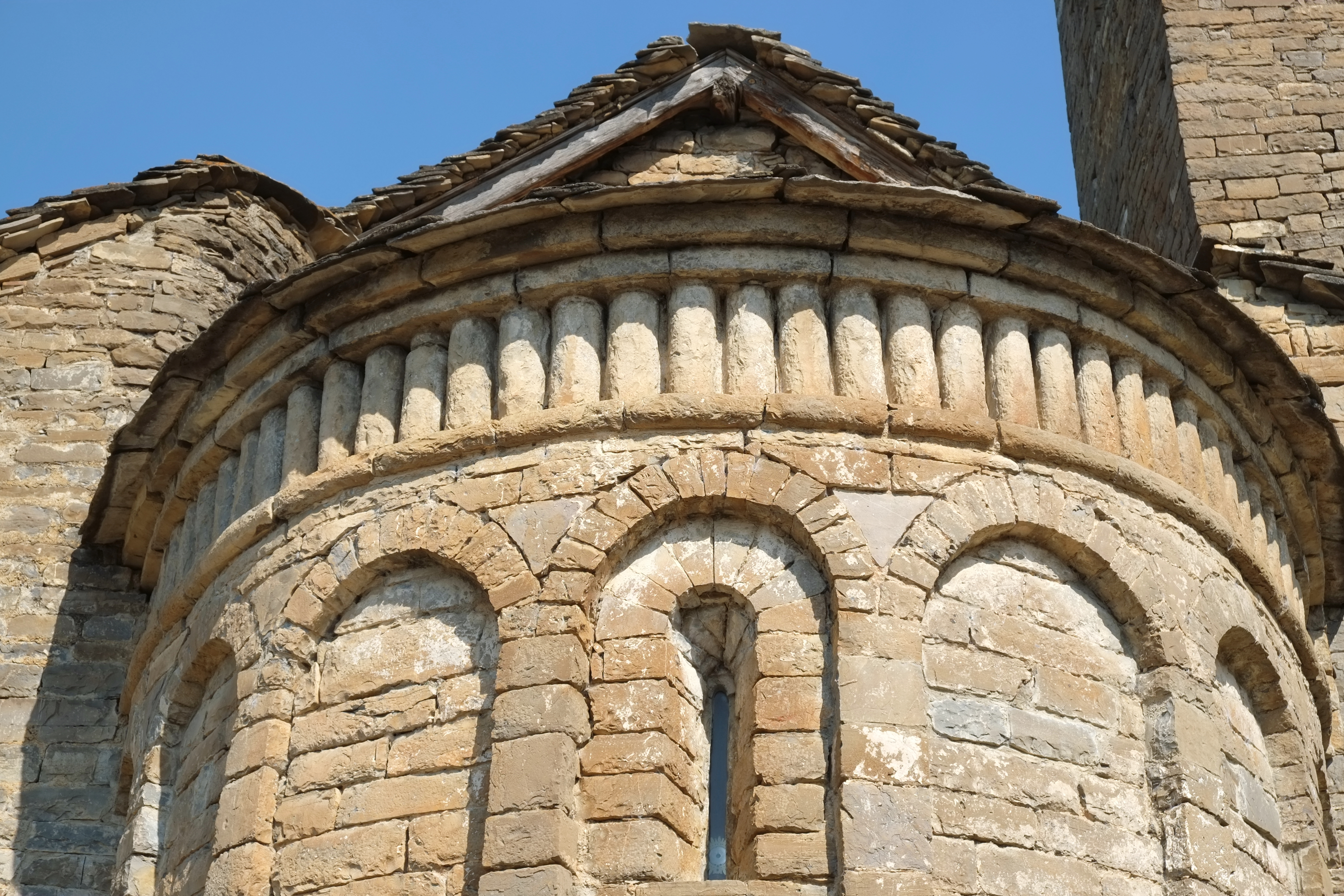 Kirche San Martín in Oliván in der Provinz Huesca in Aragonien (Spanien)